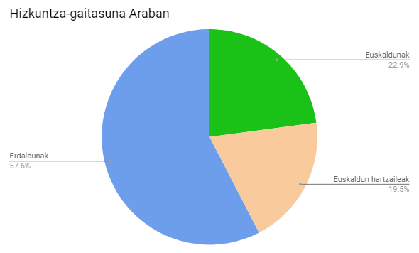 Arabako hizkuntza-gaitasuna, 2011ko ikerketa soziolinguistikoaren arabera.